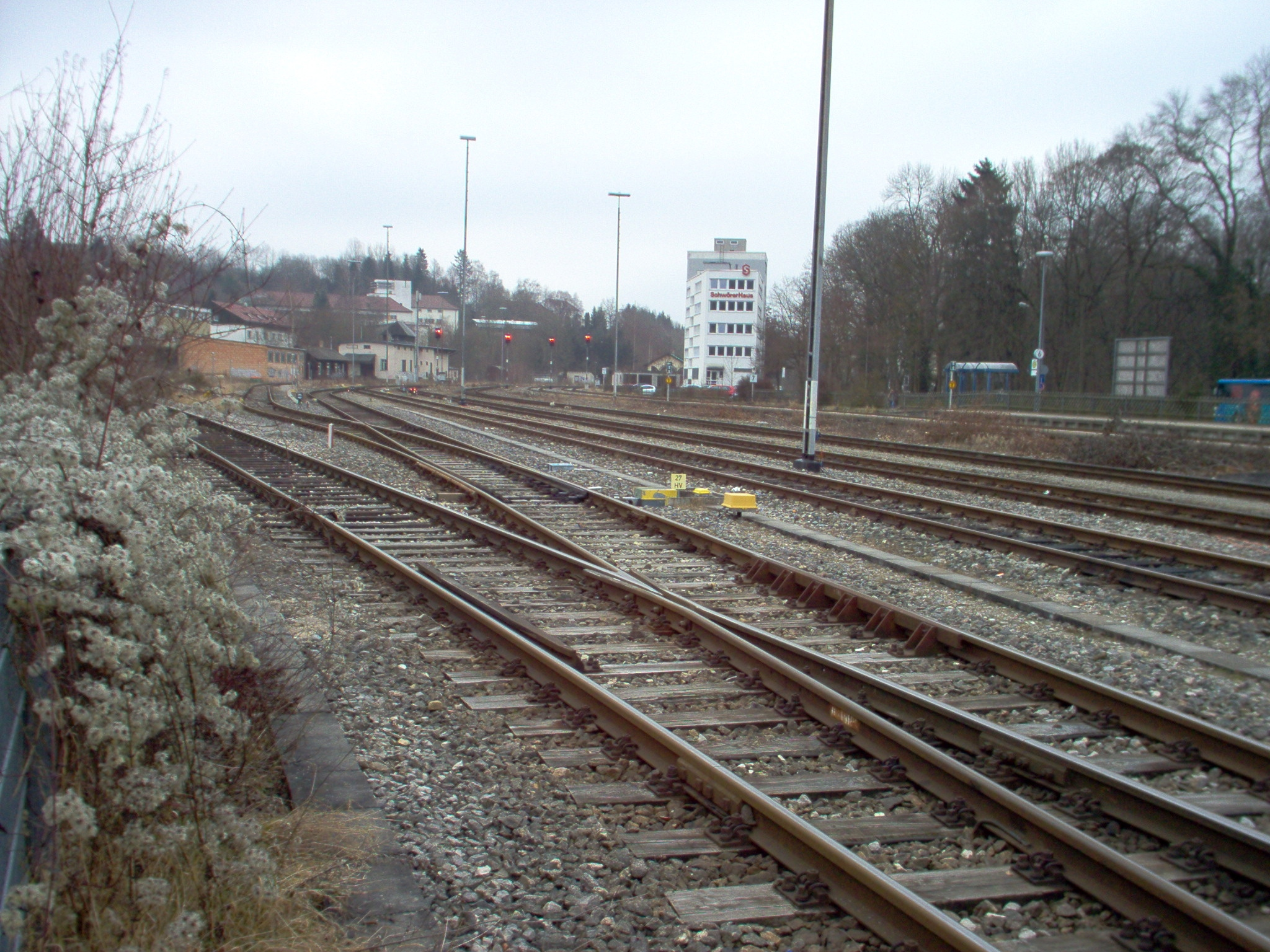 Zusammenschluss der Schienennetze von Hohenzollerischer Landesbahn und Deutscher Bahn nahe dem Sigmaringer Bahnhof